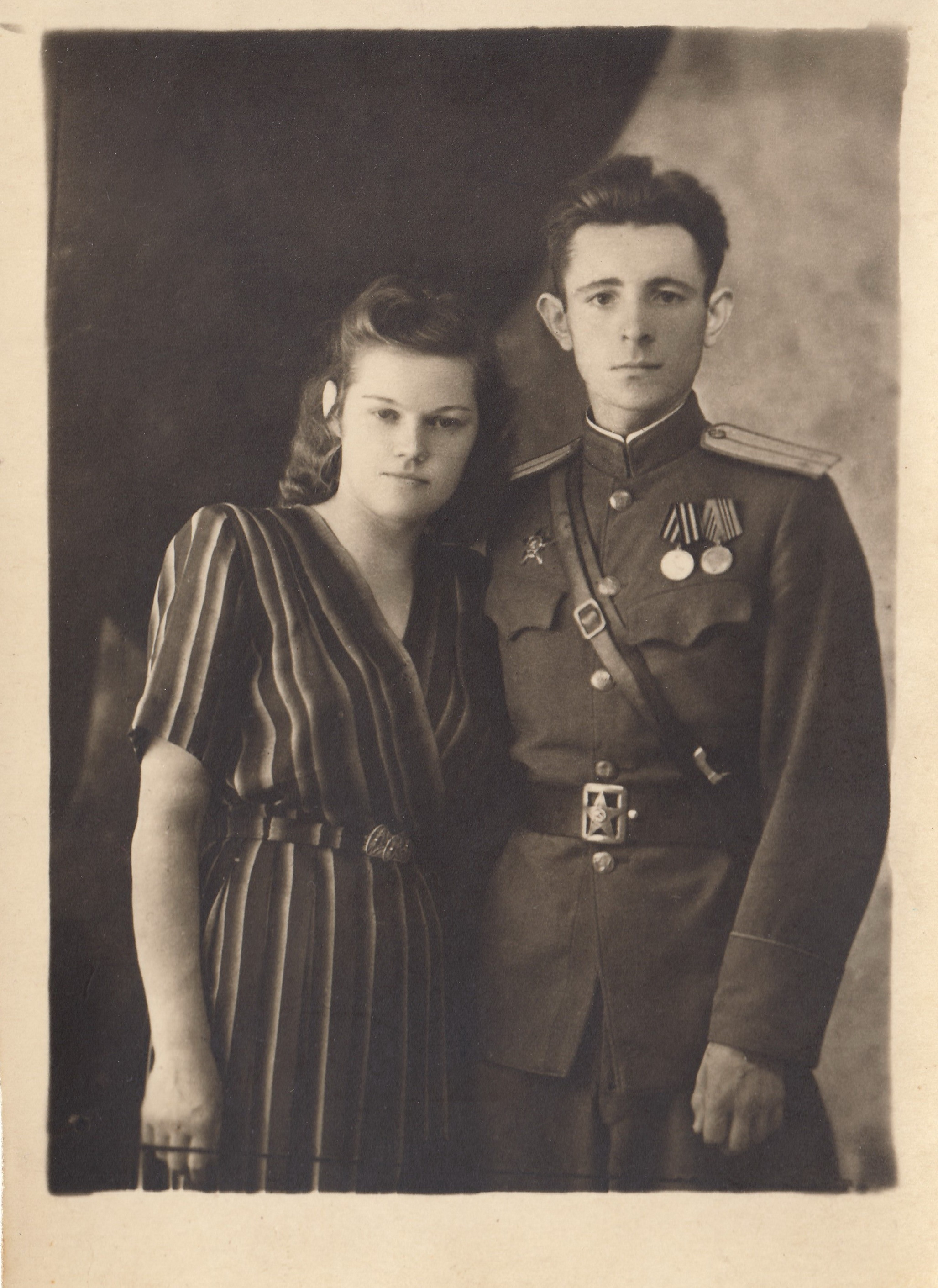 Писатель Юрий Тарасович Грибов со своей женой Антониной Александровной